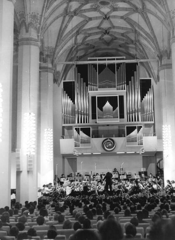 Frankfurt/Oder, Konzerthalle ADN-ZB Rehfeld-28.5.77 Frankfurt-Oder: Treffen der Freundschaft-Die Eröffnungsveranstaltung des Festes junger sozialistischer Künstler fand am 28.5. in der Konzerthalle statt. Das Sinfonie des Festivalorchesters der Freundschaft VR Polen-DDR spielte Werke von Beethoven, Chopin Schostahivitsch. In diesem Orchester wirkten Studenten der Hochschulen für Musik Warschau, Belin, Leipzig, Dresden und Weimar mit. (Foto von der Generalprobe am 27.5.77)